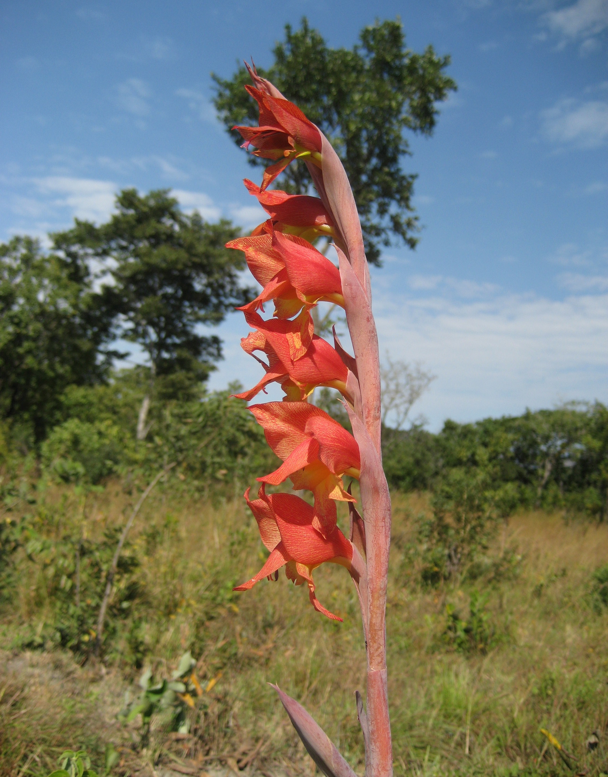 Gladiolus dalenii - Gurungue